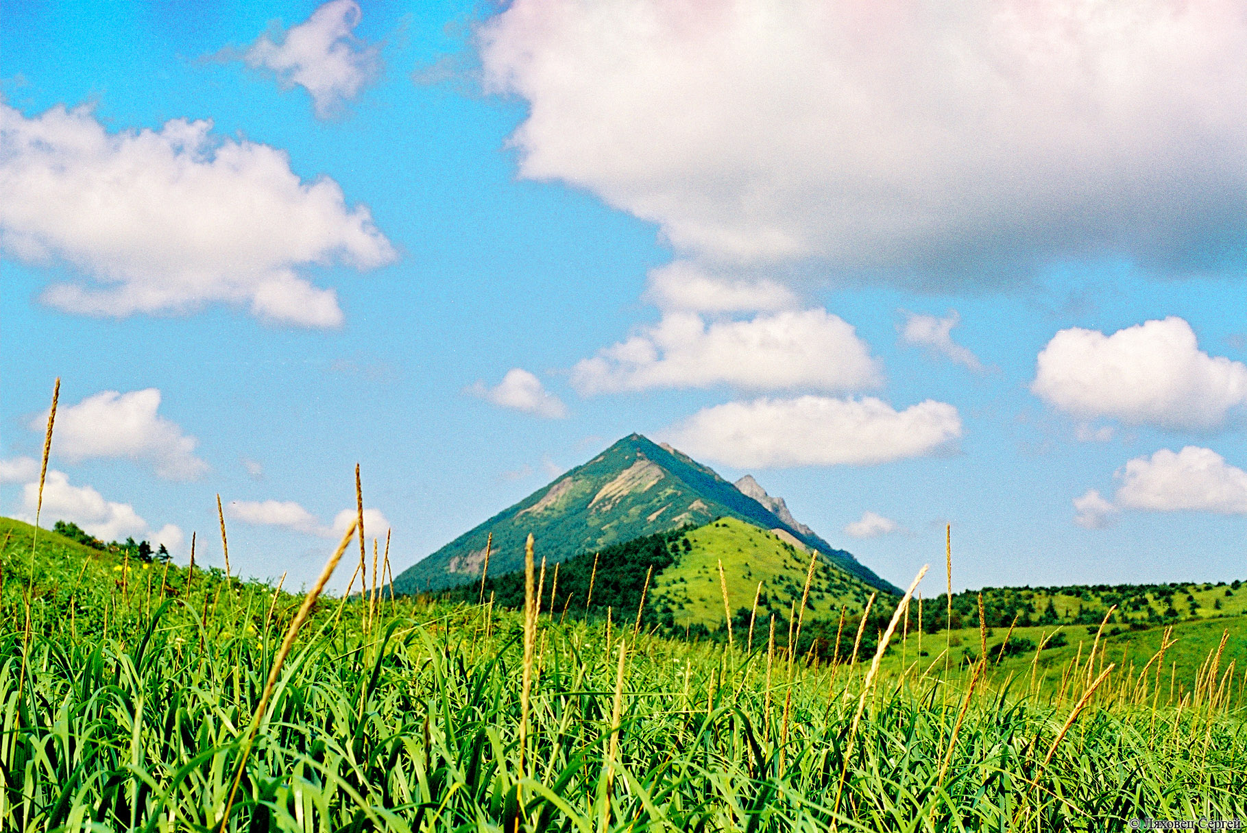 Хребет Жданко: - 48°03'26" N 142°32'53" E. Координаты центральной точки - 48°03'44" N 142°31'52" E.,Макаровский район, Сахалинская область This image is related to the protected area of Russia number 6510057